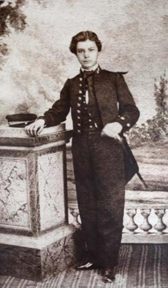 Arturo Prat con su uniforme de guardiamarina de 2da clase. Fotografía tomada entre 1862 y 1863, cuando tenia alrededor de 15 años.